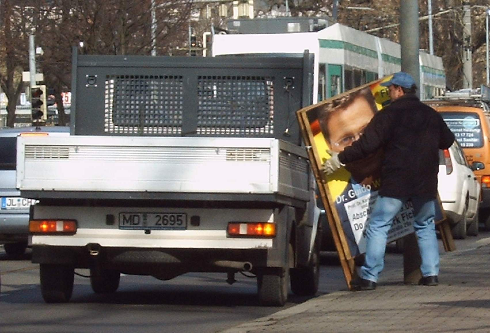 Ein Mitarbeiter des Ordnungsamtes der Stadt Magdeburg entfernt ein falsch aufgestelltes Wahlplakat der FDP, Landtagswahl Sachsen-Anhalt 2006